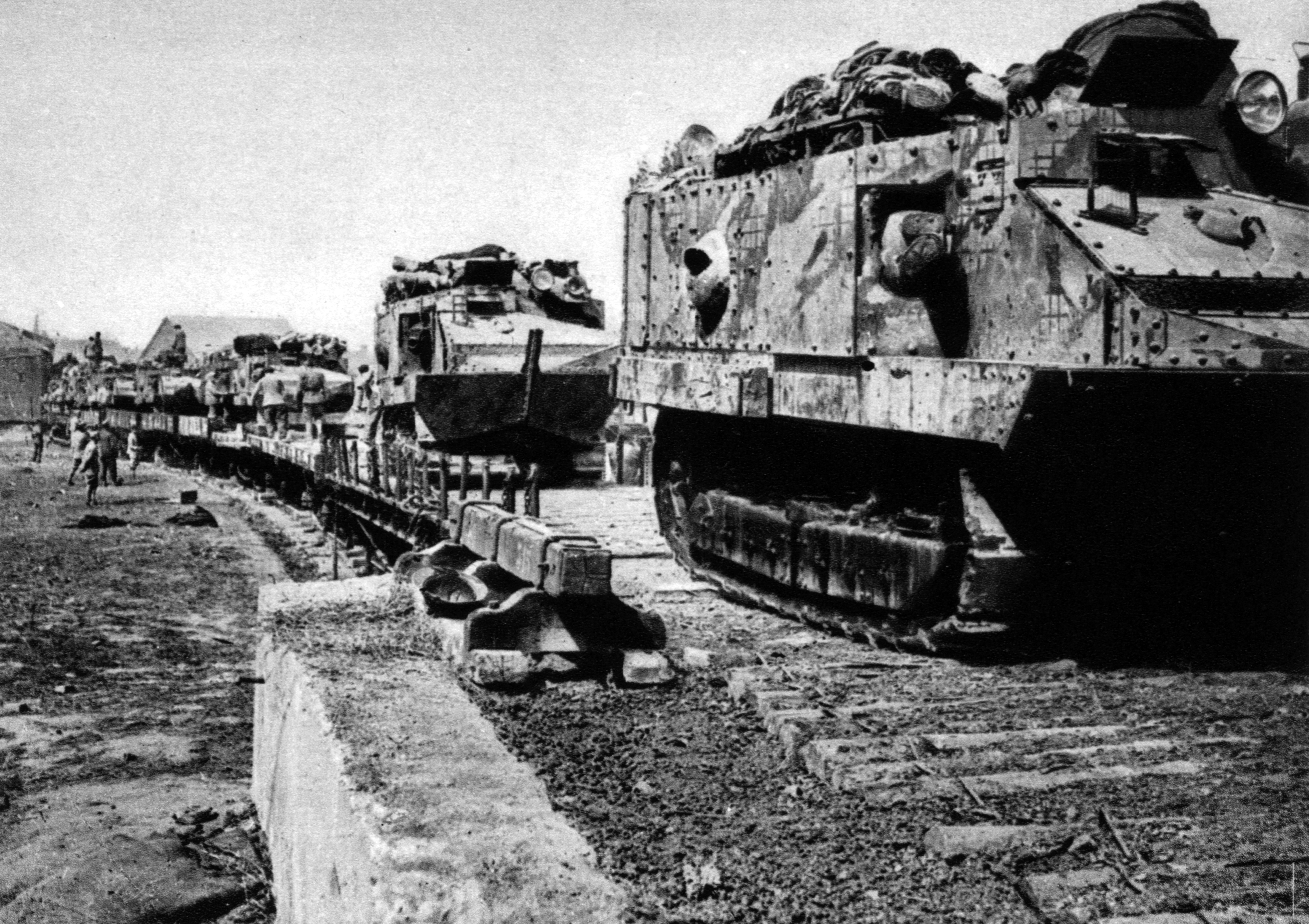 Tanks in einem Feldbahnhof